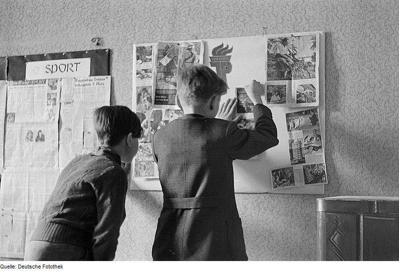 Original image description from the Deutsche Fotothek Zwei Jungen beim Erstellen einer Pionier-Wandzeitung